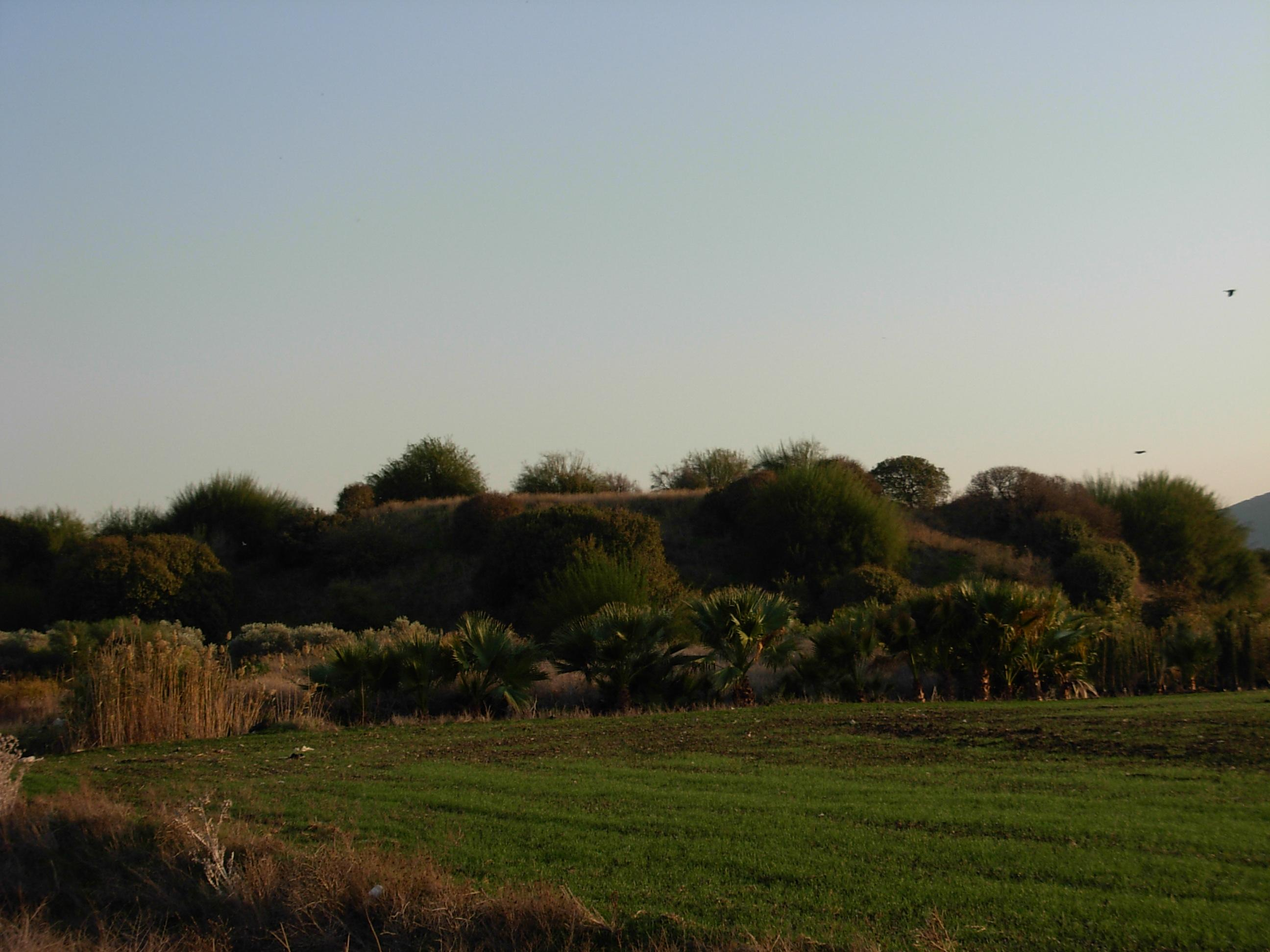 Tel Regev